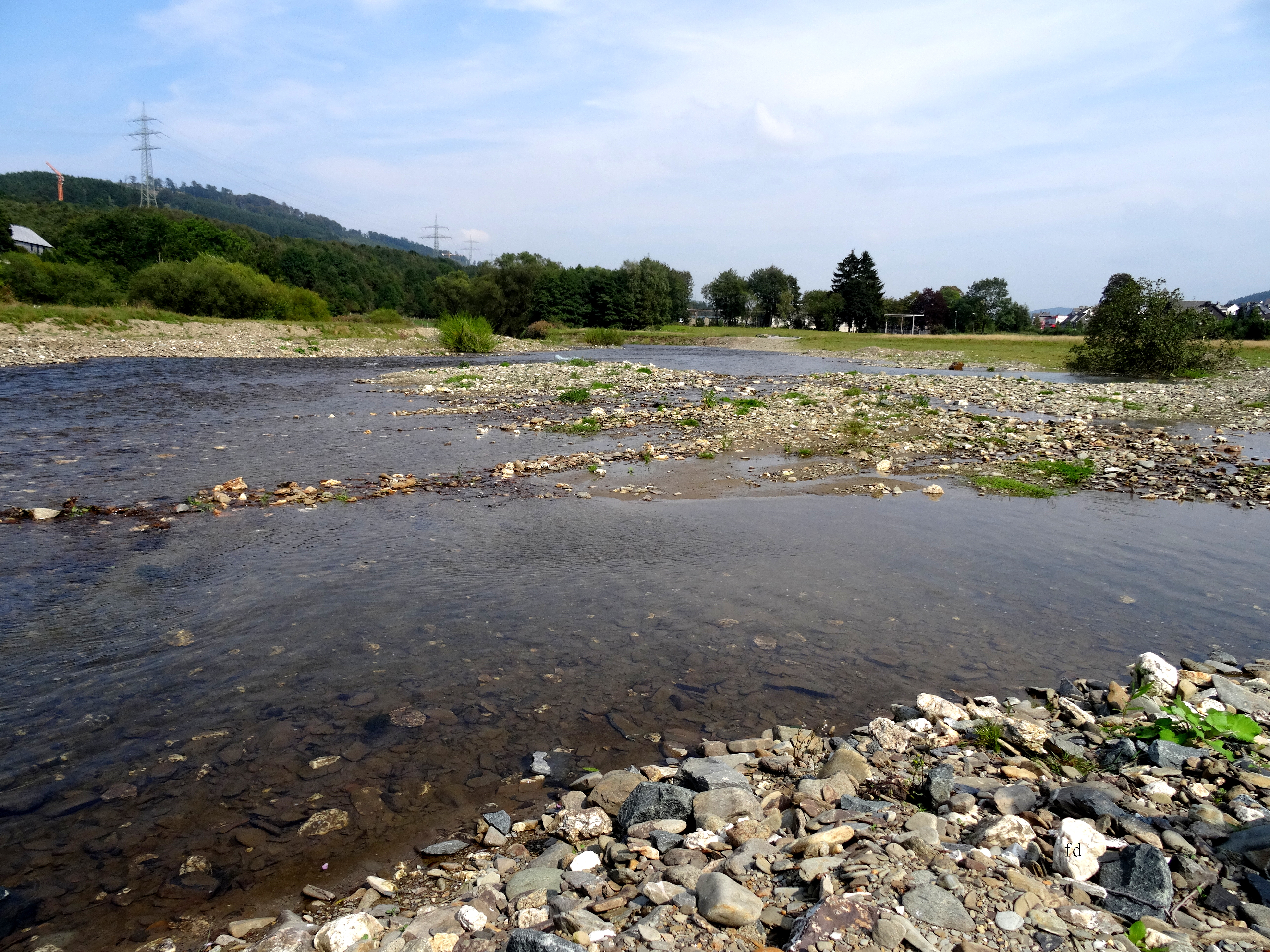 Naturschutzgebiet Ruhrtal bei Bestwig mit der renaturierten Ruhr